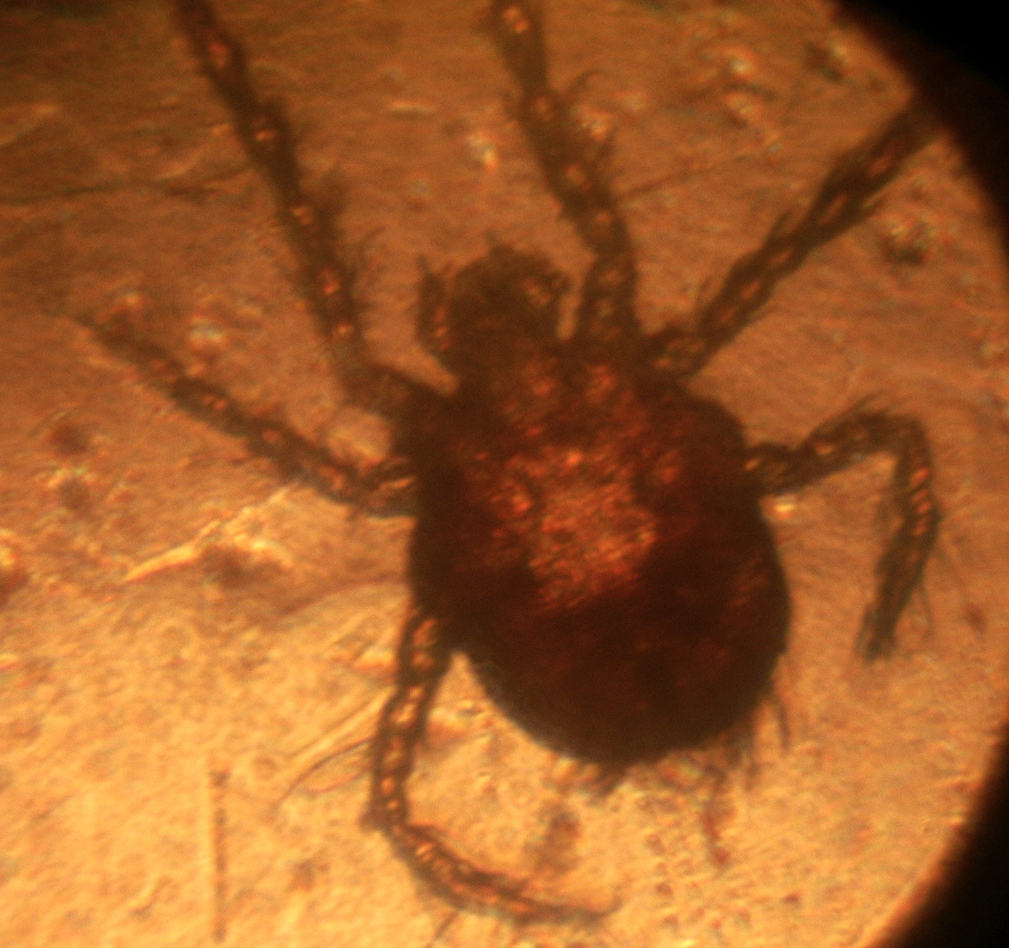 Photo d'aoûtat (Trombicula autumnalis) prise au microscope